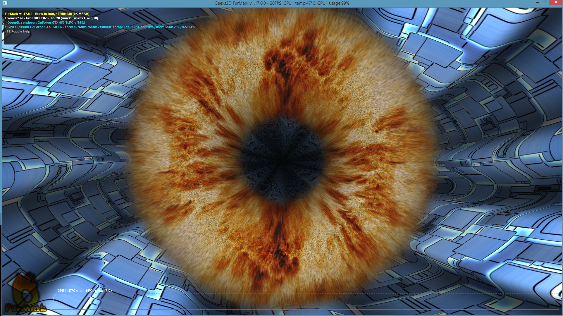 Geek3D FurMark GPU stress test